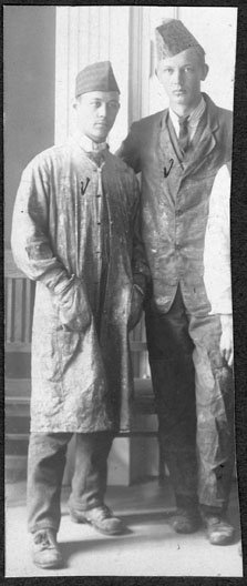 Väinö Kunnas ja Olli Miettinen Viipurin taiteenystävien piirustuskoulussa vuonna 1914